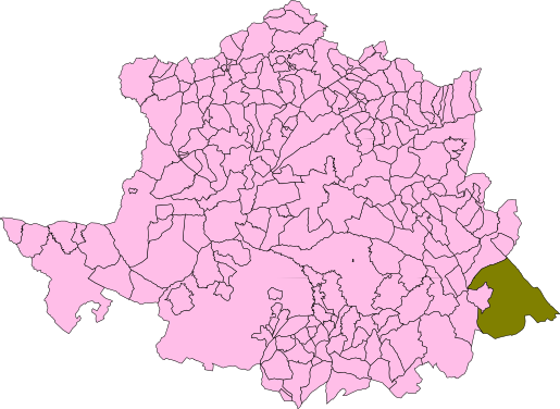 Alía